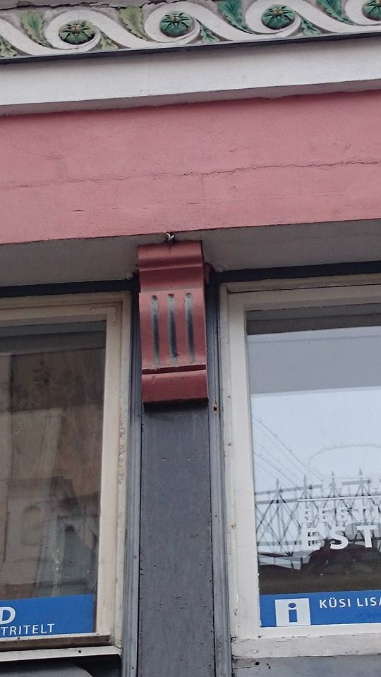 Tallinna vanalinnas, Viru 3 asuva hoone ulgkivi